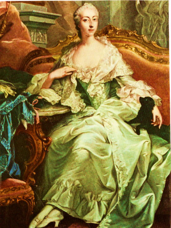 Анна-Мария, графиня Штадионская Мода эпохи рококо